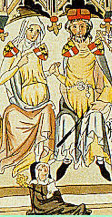 Berthold IV, duc de Méranie, et d'Agnès de Wettin